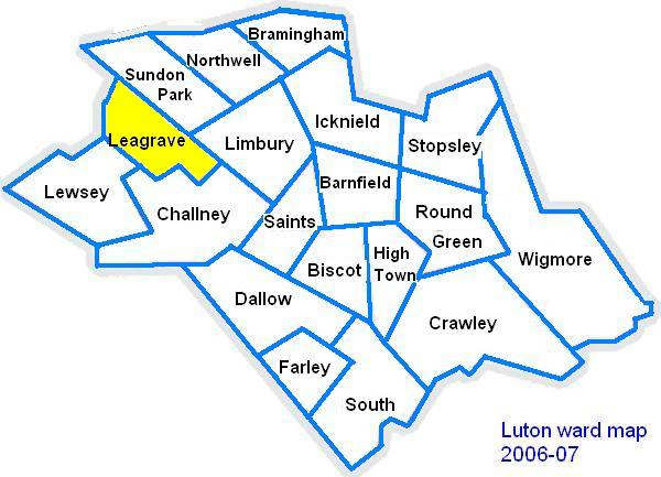 luton map showing leagrave